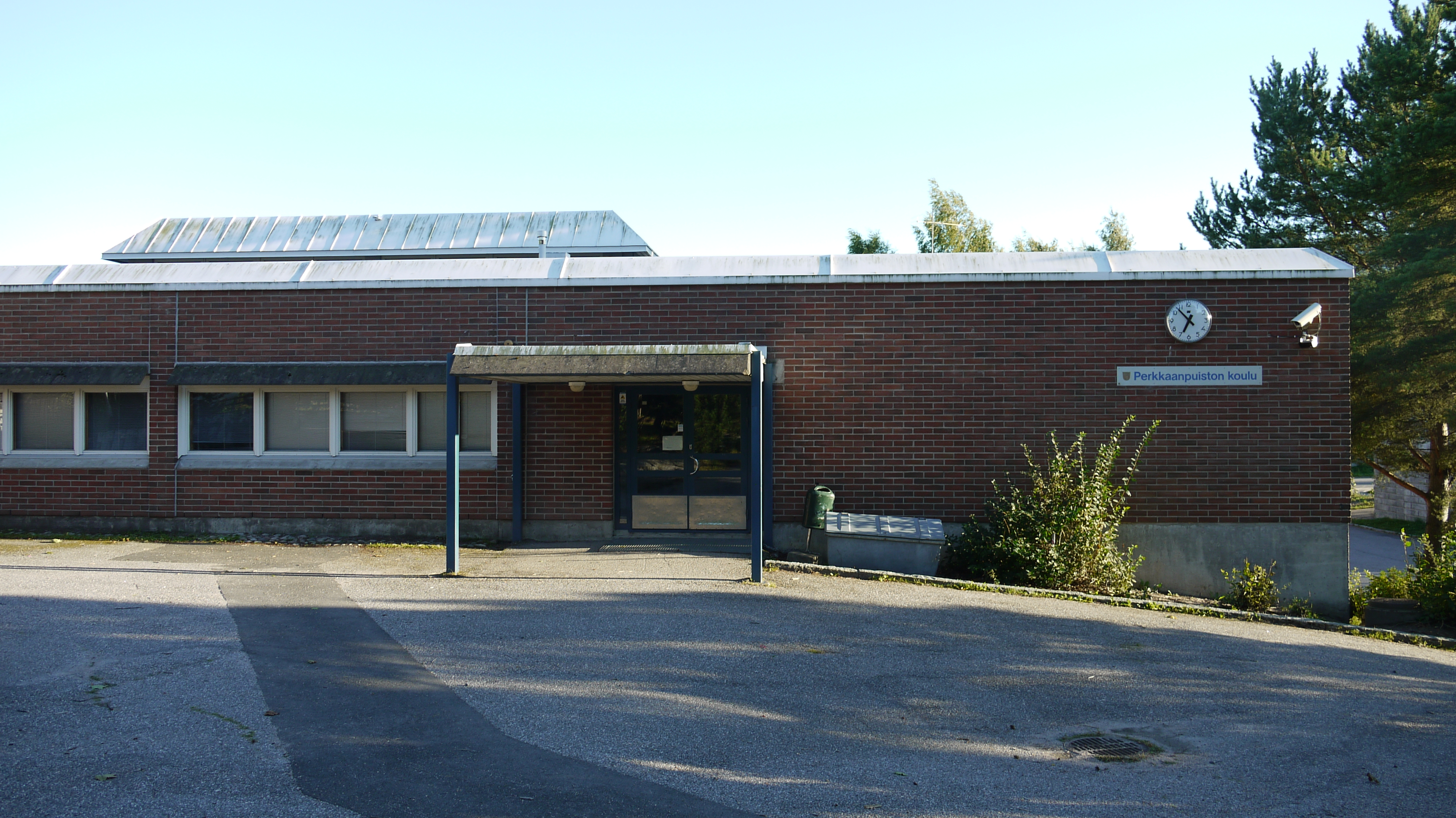 Perkkaanpuiston koulu Espoossa